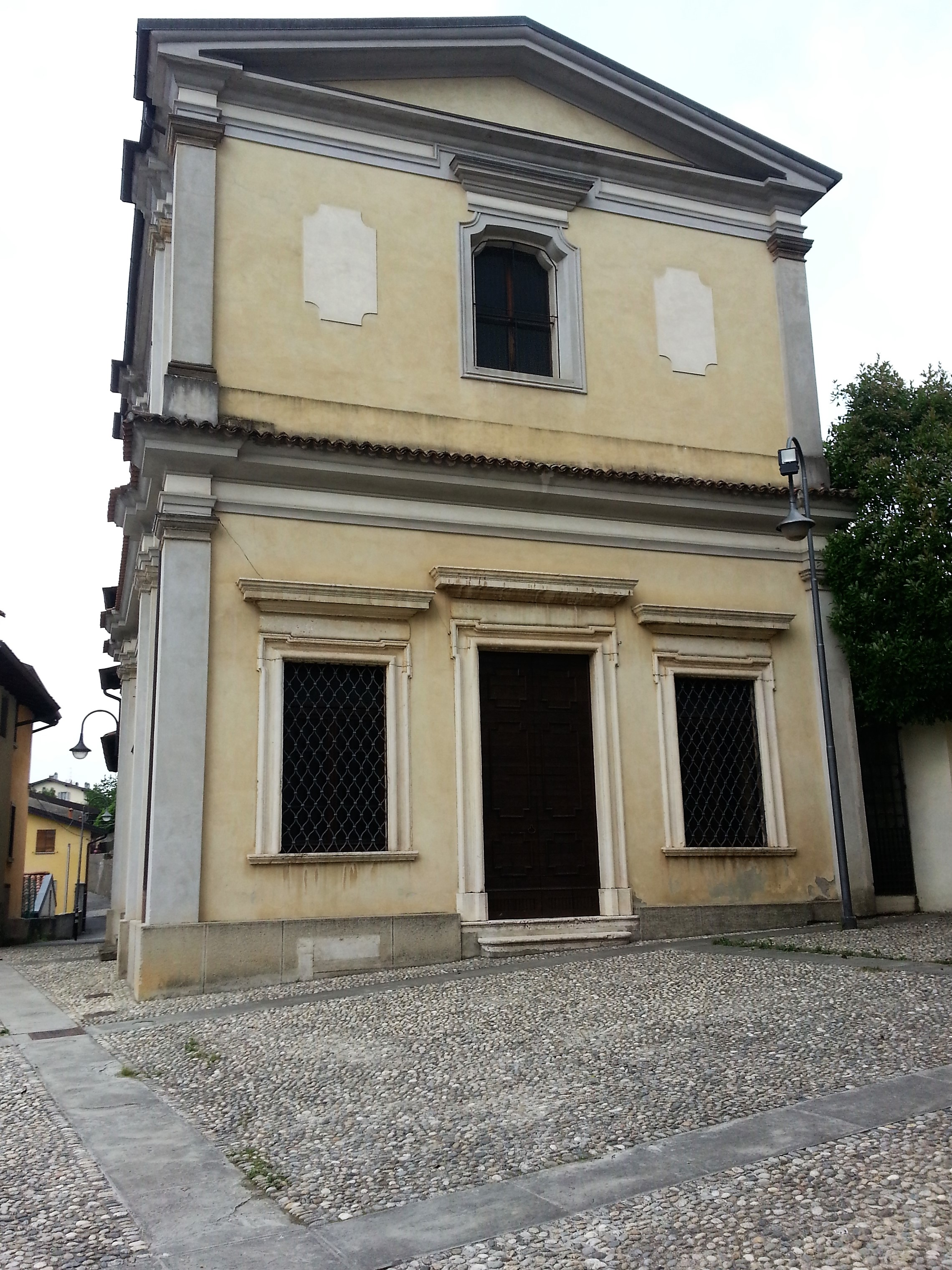 Chiesa di san Pantaneone